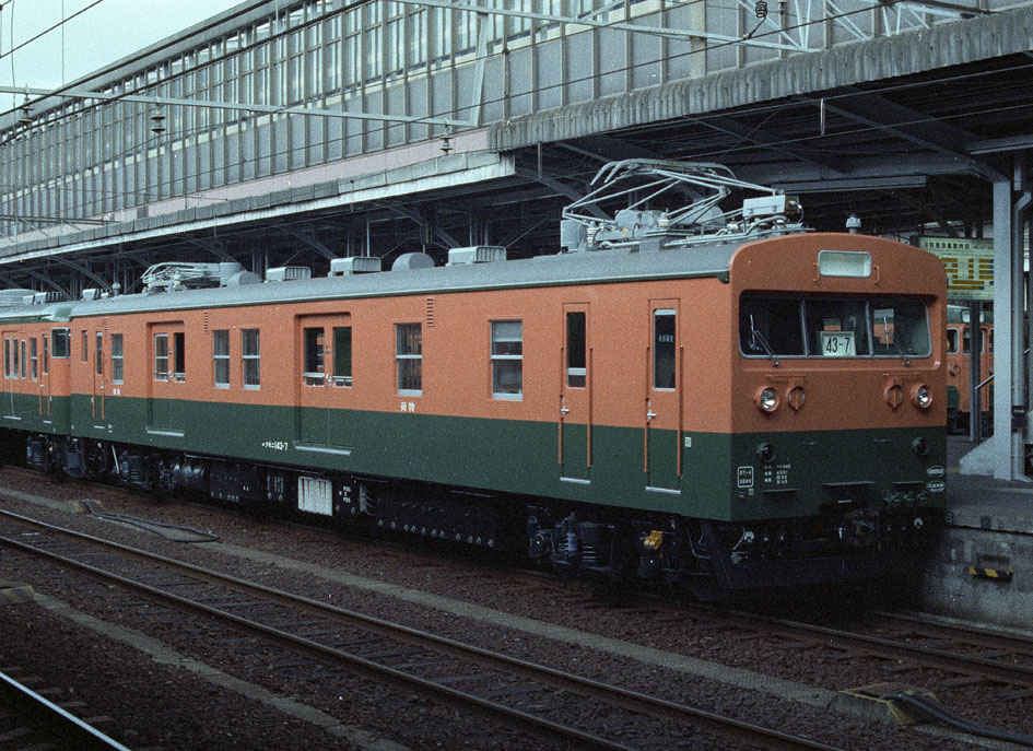 国鉄クモニ143-7